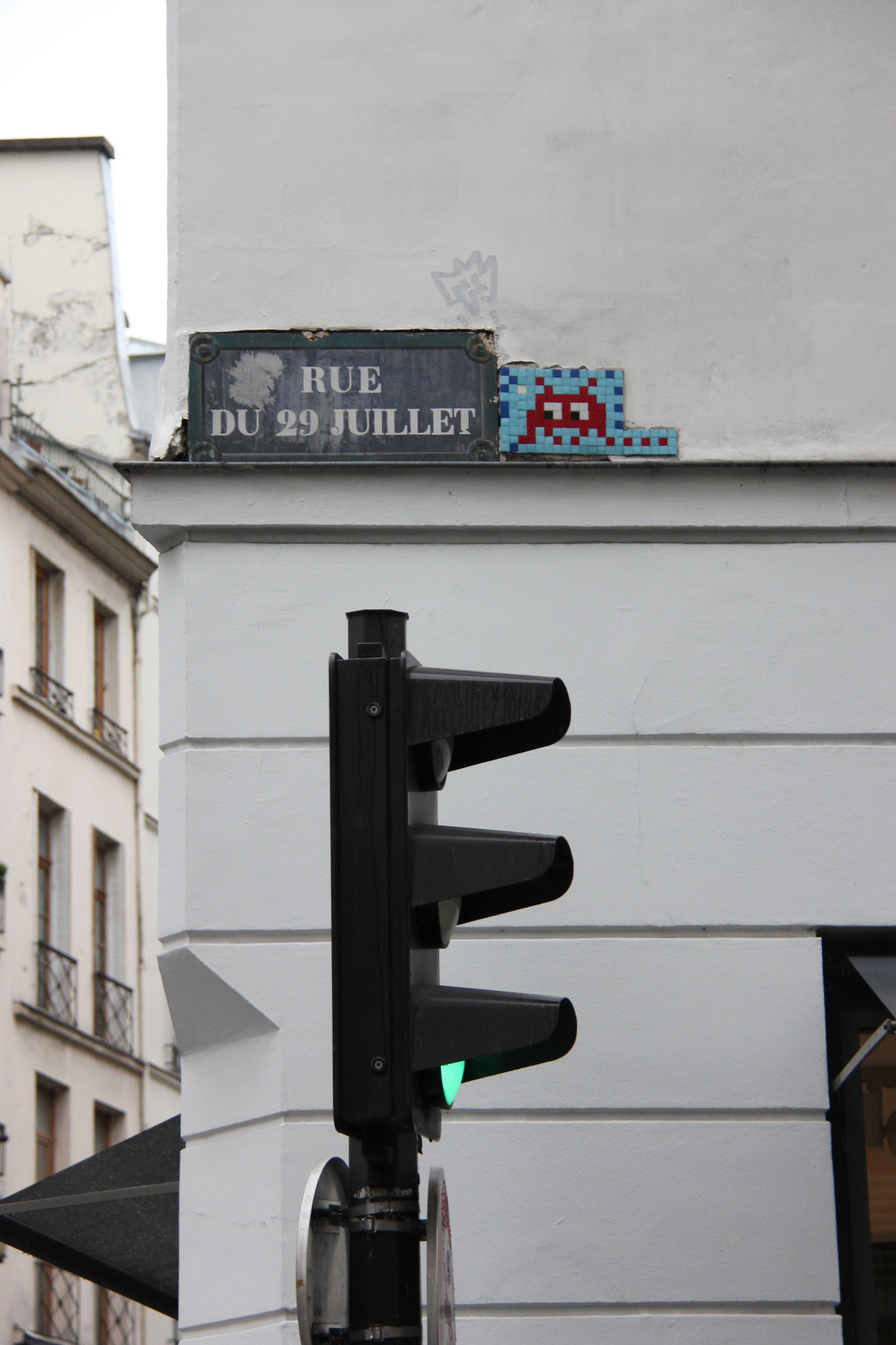 Space Invader et Zevs, rue du 29-Juillet à Paris